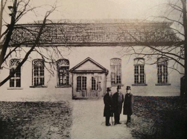 Mennonitenkirche Königsberg um 1899, im Vordergrund Vorsteher (Vorstand) der Gemeinde